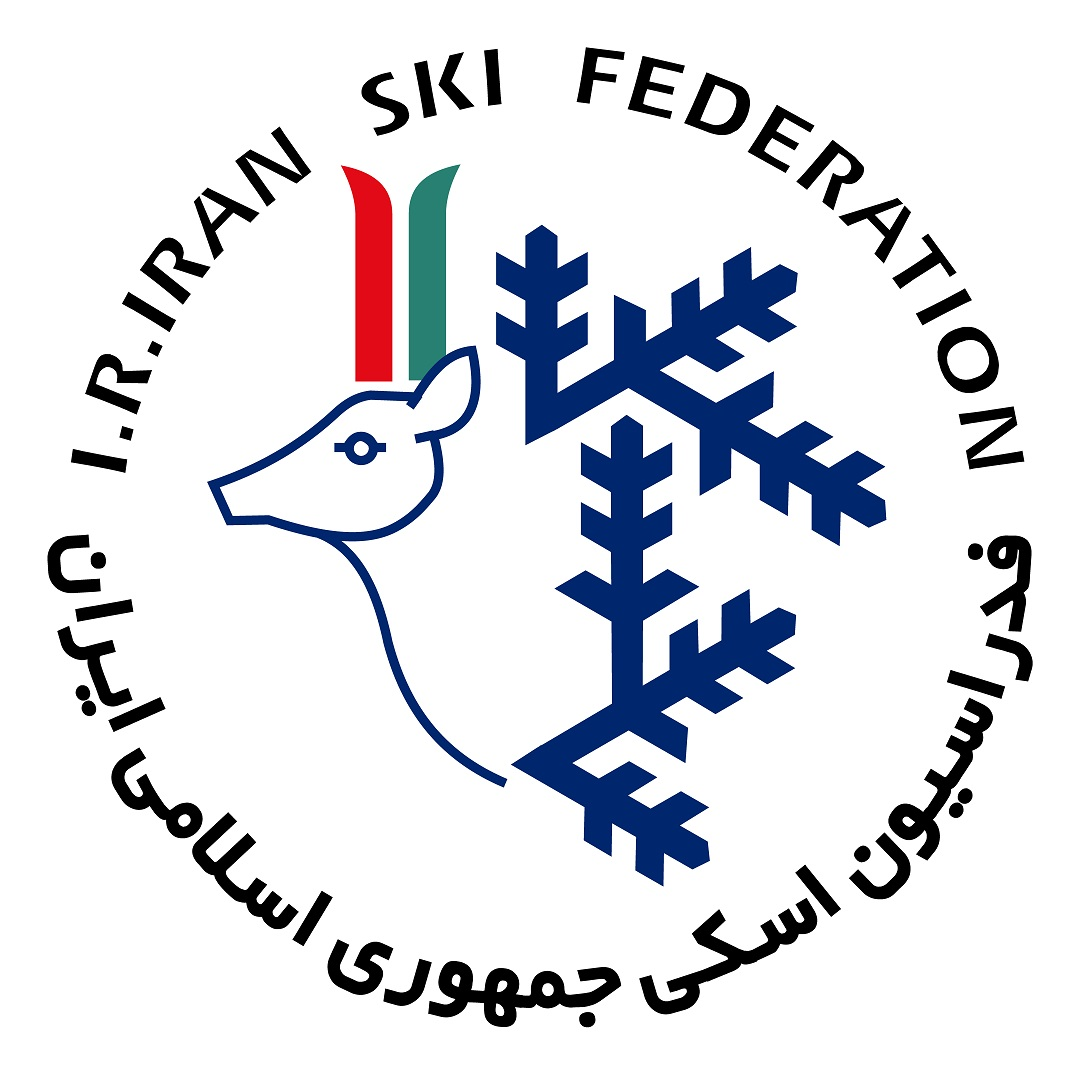 لوگوی فدراسیون اسکی ایران